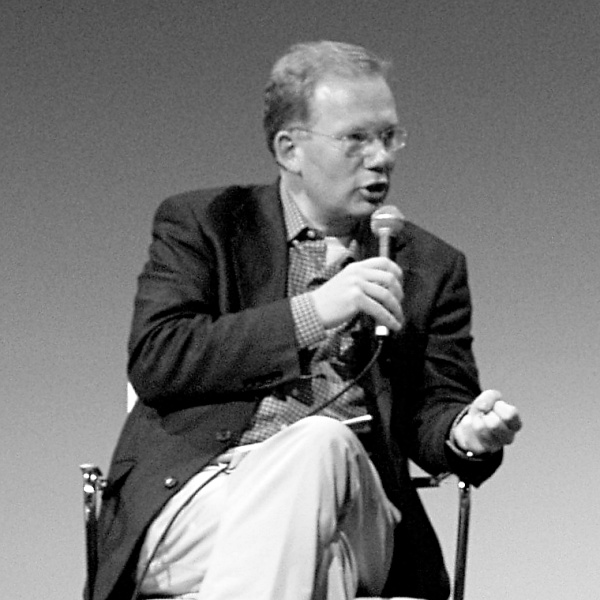 Sebastian Turner, Vorstandsvorsitzender Scholz & Friends AG, Berlin, auf dem Deutschen Evangelischen Kirchentag 2007 während der Veranstaltung „Bilder-Welten – Welt-Bilder: Die Macht der Bilder verantworten – ein Gespräch mit Bildermachern“.